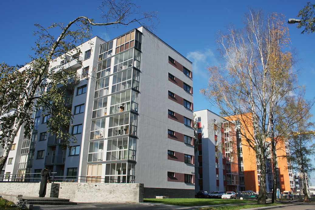 Construction of 2006 in Šiaurės miestelis of Žirmūnai, Vilnius.